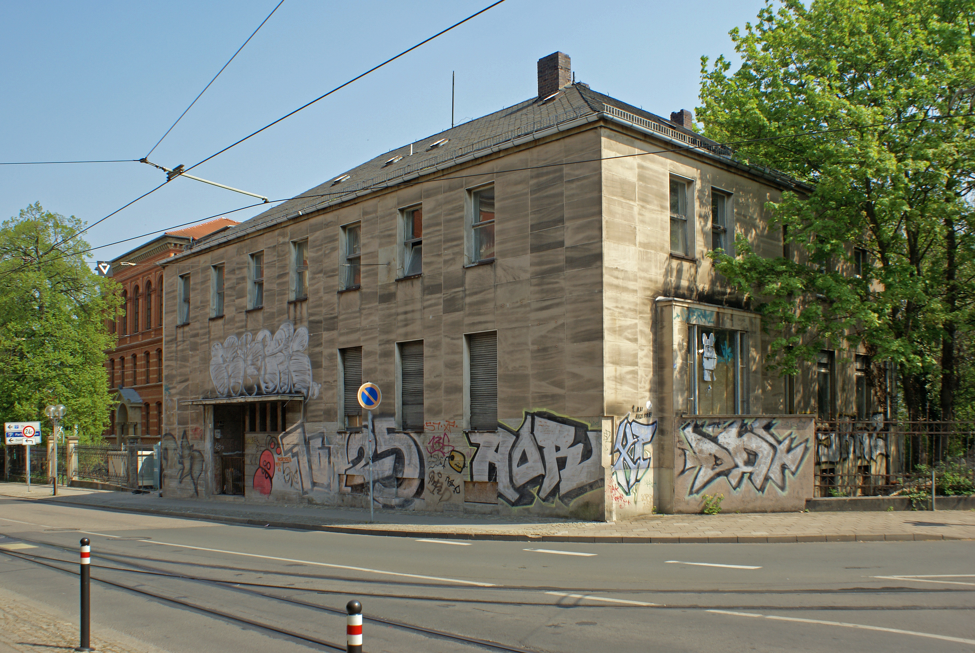 Das Stadthaus Wolff in der Regierungsstraße 43 in Erfurt - Thüringen, Deutschland. Baujahr: 1931 Architekt: Theo Kellner